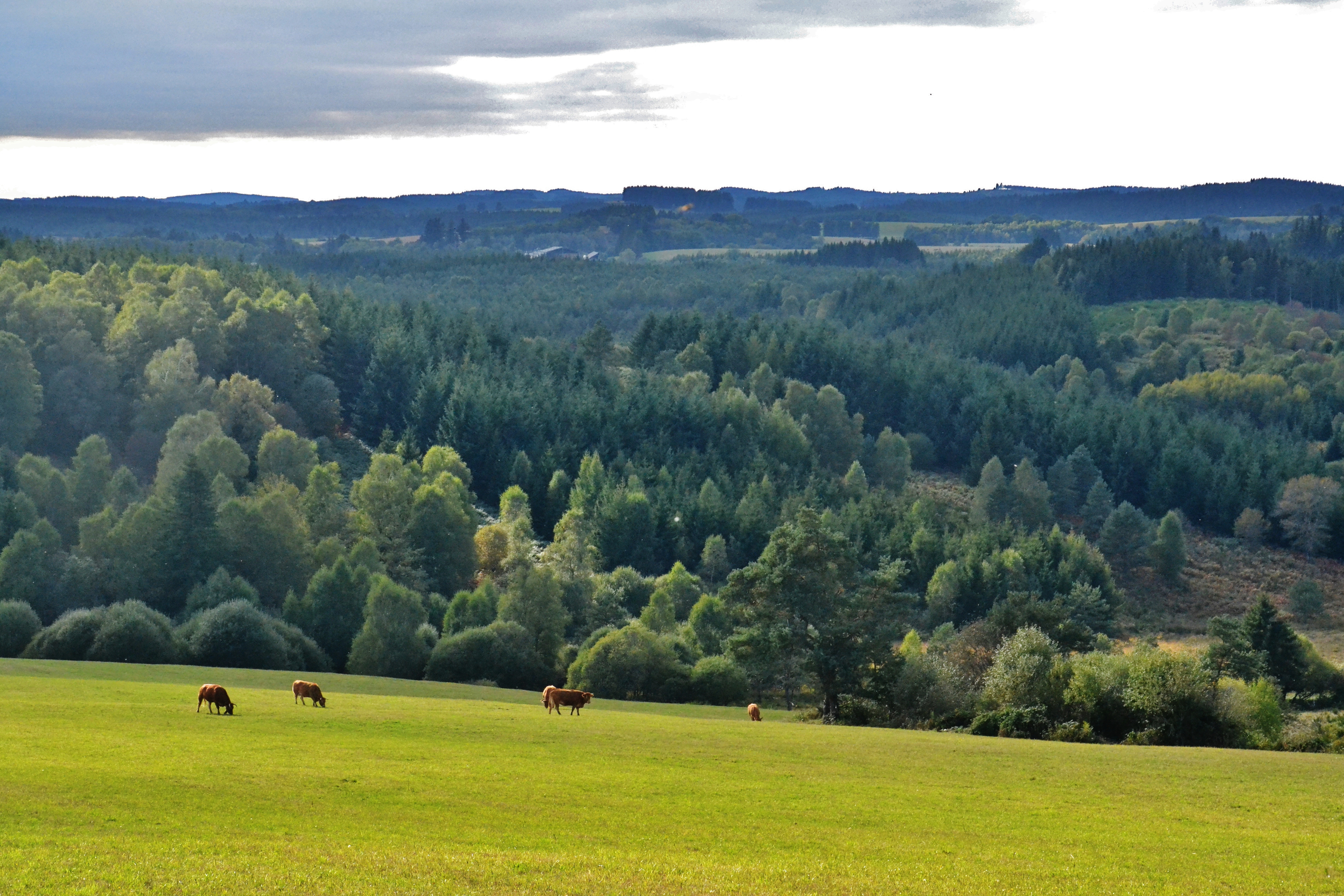 Le plateau de Millevaches depuis le chemin d'accès à la source de la Vienne, commune de Saint-Setiers (Corrèze, France) (vue vers l'ouest)